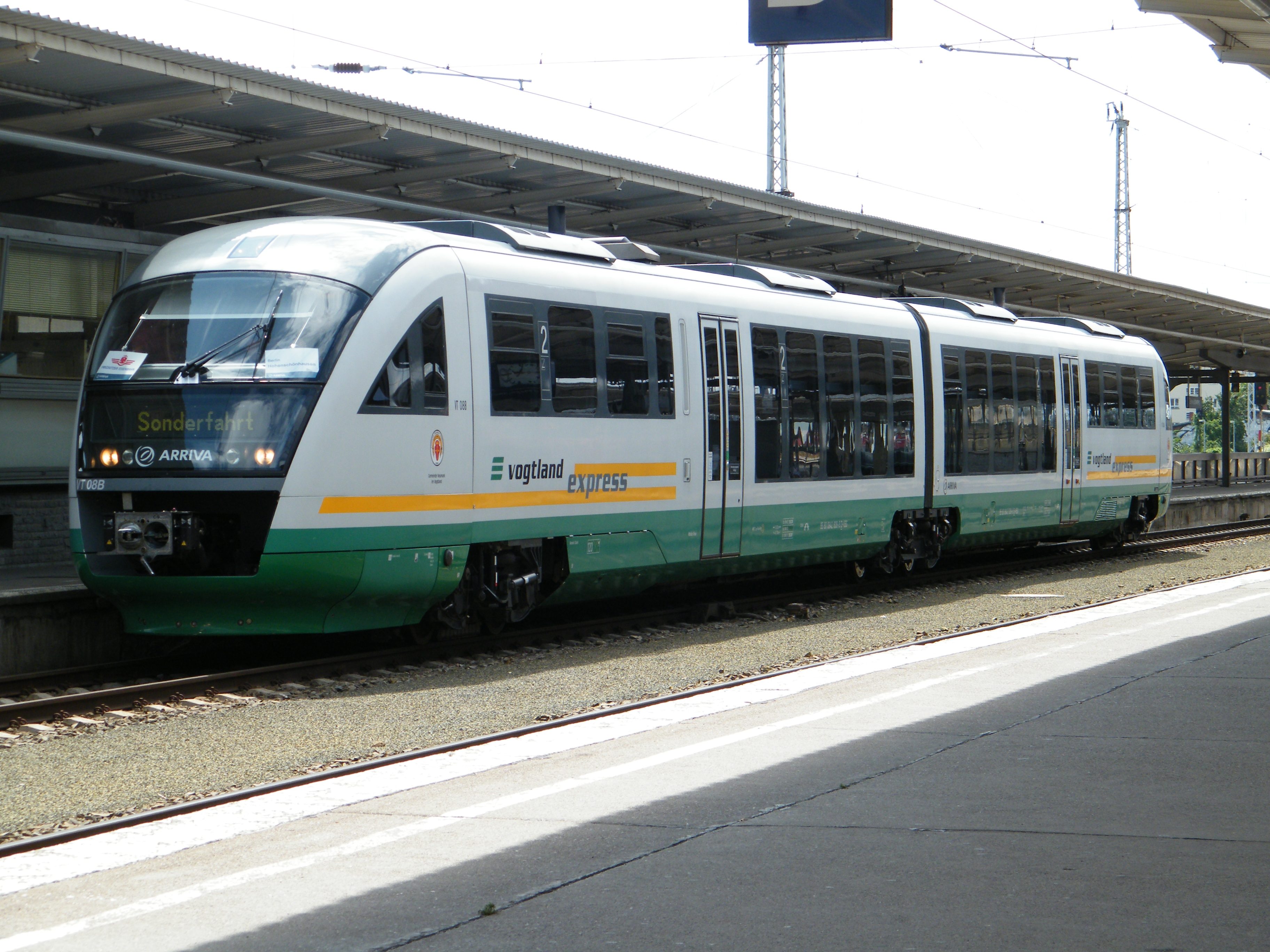 Die Vogtlandbahn hilft für die PEG (beide Arriva) der Berliner S-Bahn aus und fährt zwischen Berlin-Lichtenberg und Hohenschönhausen als Ersatz für die S75